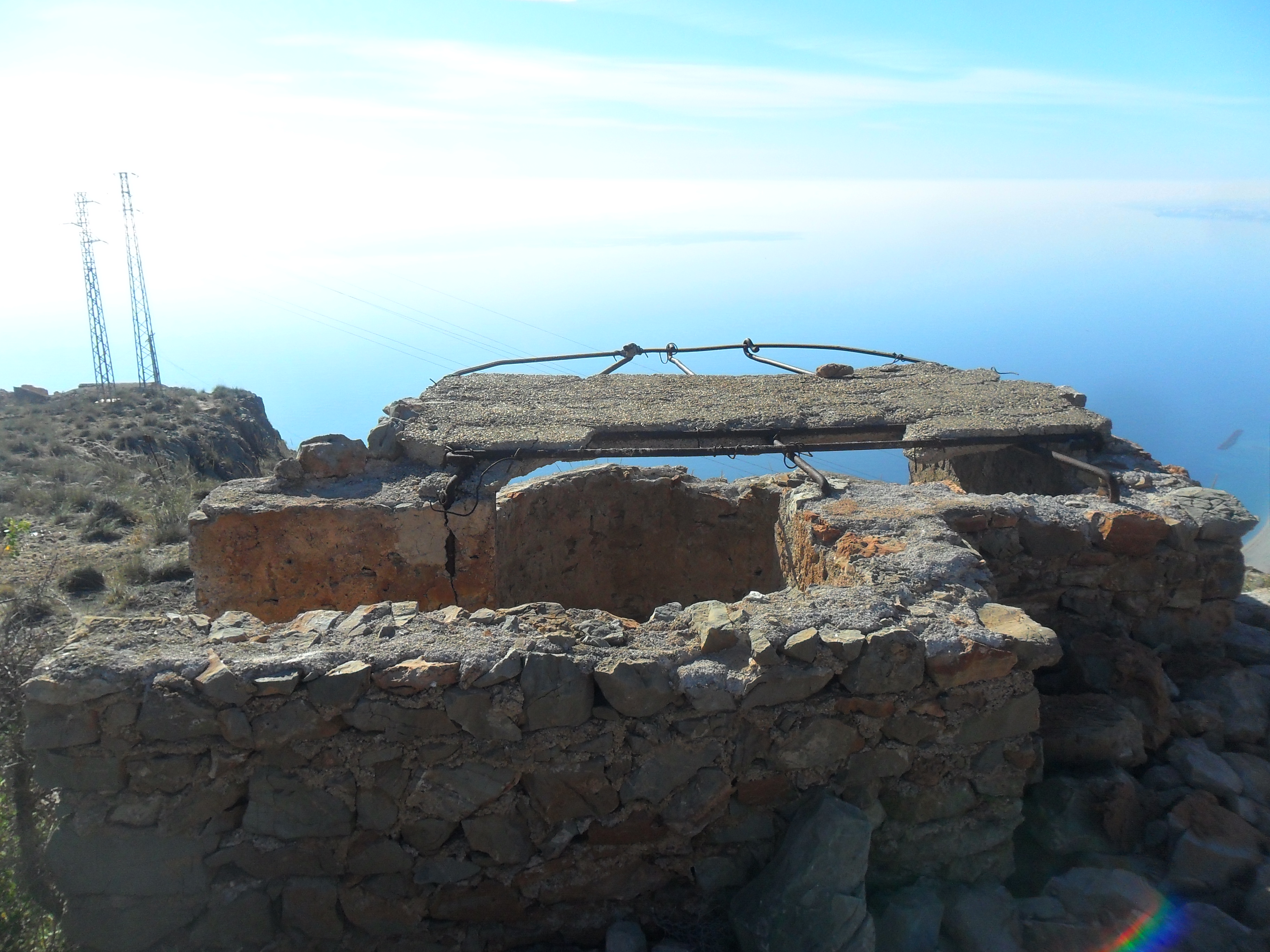 Bunker sobre Aguadulce